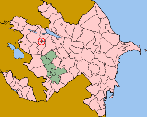 Map of Azerbaijan showing Ganja (Gəncə) sahar.